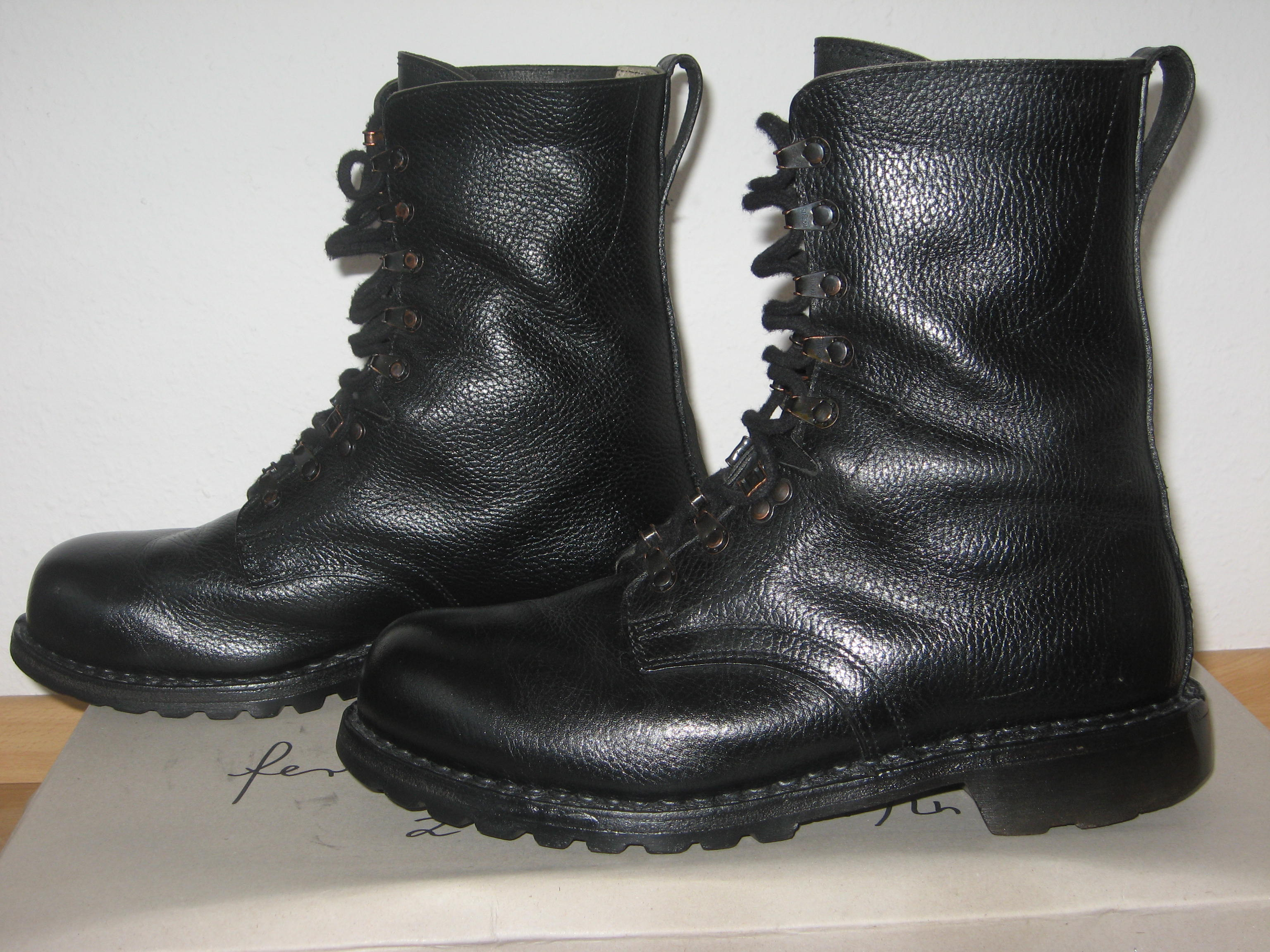 Bundeswehr-Kampfstiefel, Modell 1983, mit Lederinnenfutter